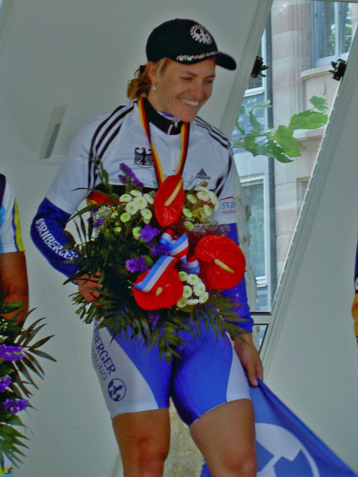 Ciclista alemanya Regina Schleicher al 2005